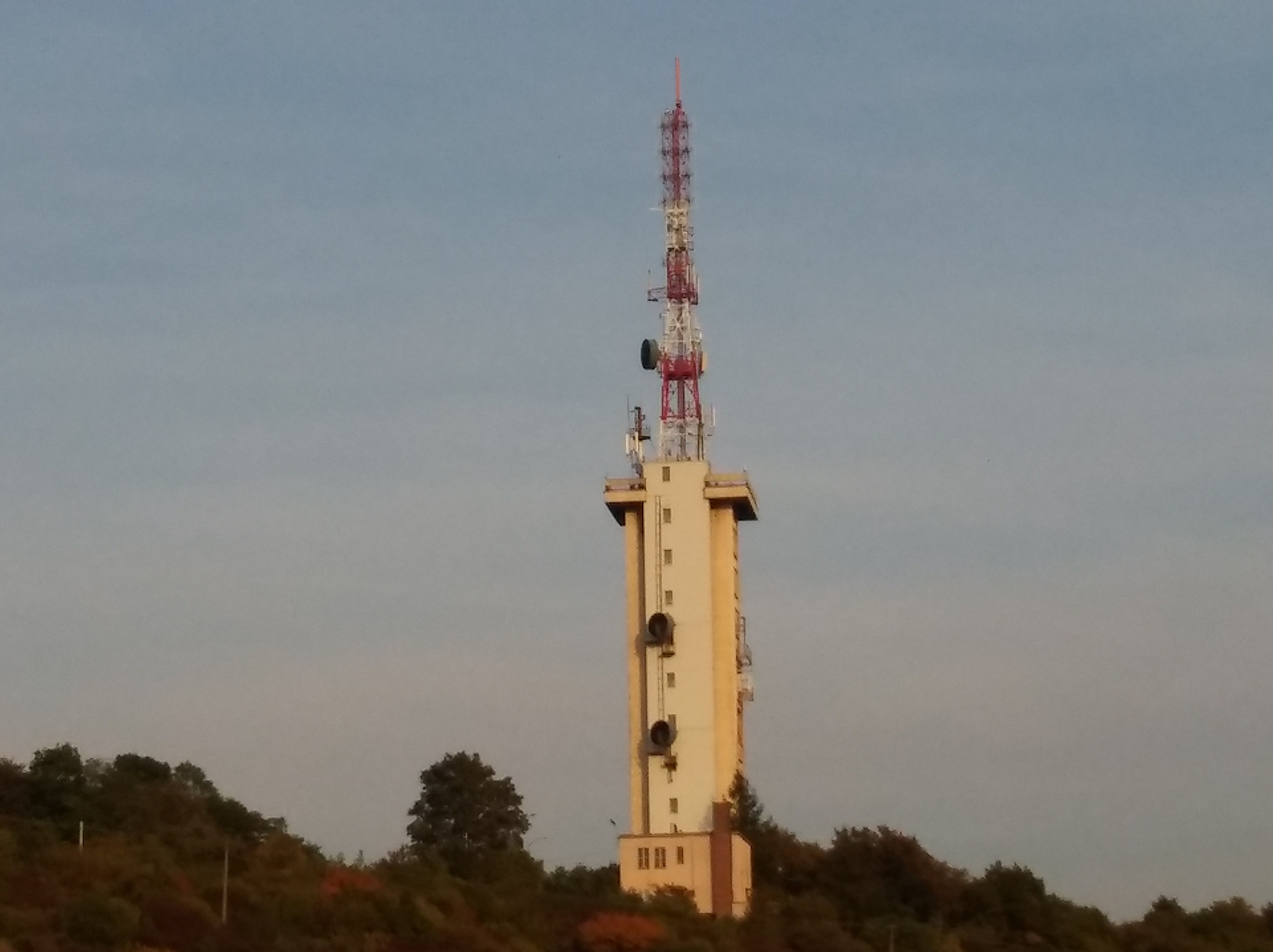 SLR Dobromierz TLW.